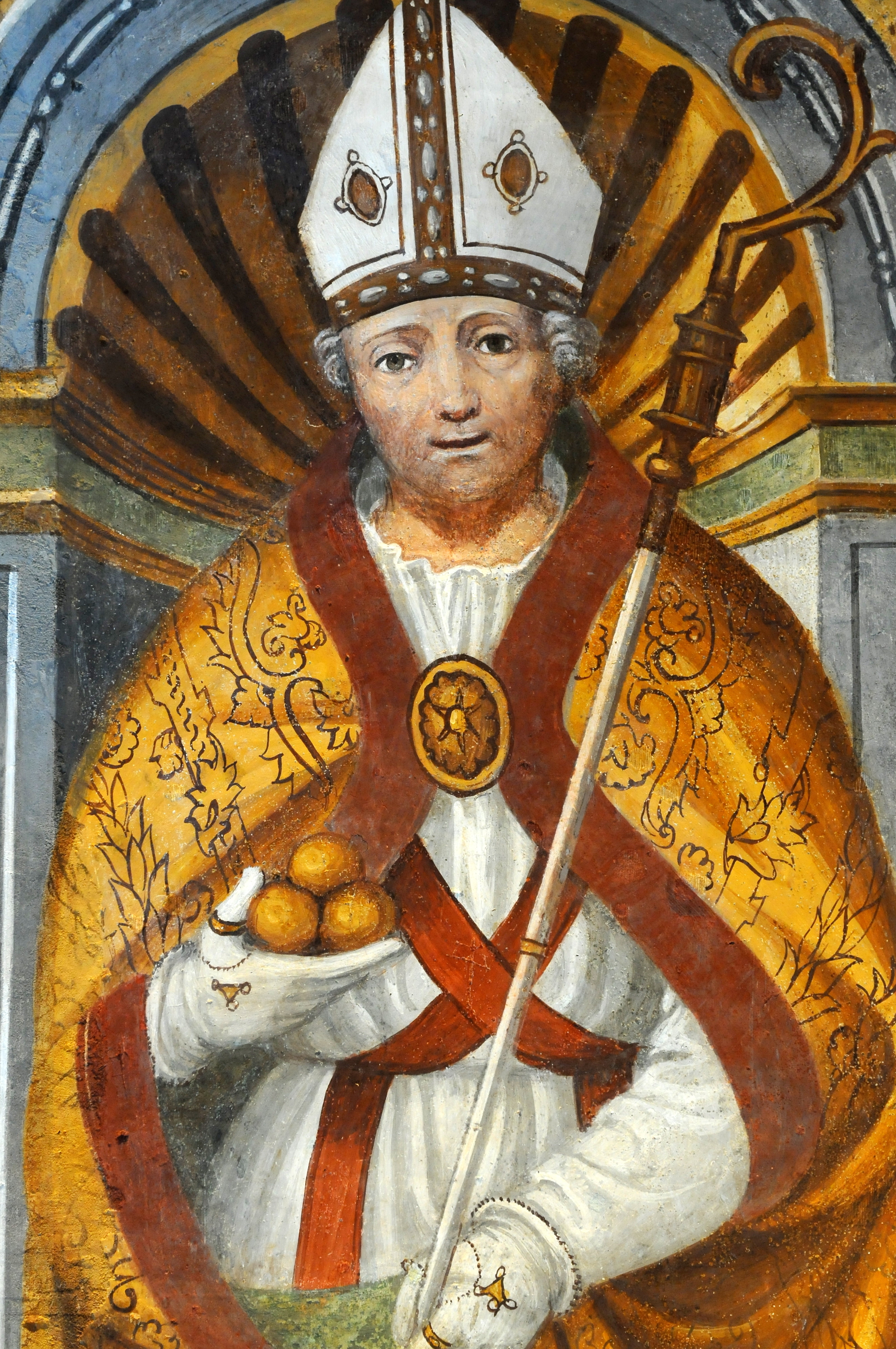 Chiesa della Trinità - S. Ambrogio